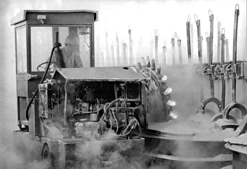 Für Bezieher des ADN-Reportagedienstes! Zum Beitrag: Arbeit, Standpunkt, Familie müssen stimmen-Die "Mamais" fühlen sich ihrer Tradition verpflichtet - ADN-ZB-Lehmann-7.6.1984-bb - Arbeitsbereich der Komplexbrigade "Nikolai Mamai" im Aluminiumwerk des Chemiekombinates Bitterfeld. Mit Hilfe von Radkrustenbrechern wird die harte Kruste der Elektrolysebäder, in denen bei fast 1000 Grad Celsius aus Tonerde Aluminium geschmolzen wird, durchstoßen. (Hierzu gehören die Fotos 1984-0607-300N - 303N!)"